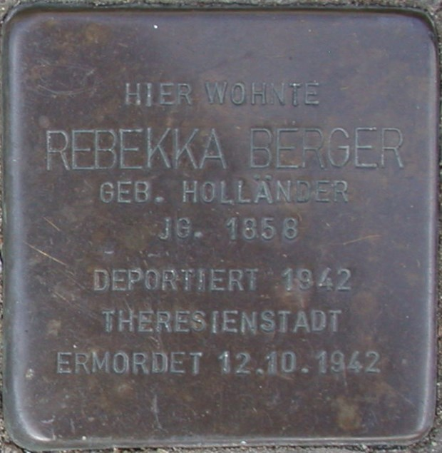 Deutschland - Nordrhein-Westfalen - Kreis Lippe - Bad Salzuflen: Stolperstein zur Erinnerung an Rebekka Berger